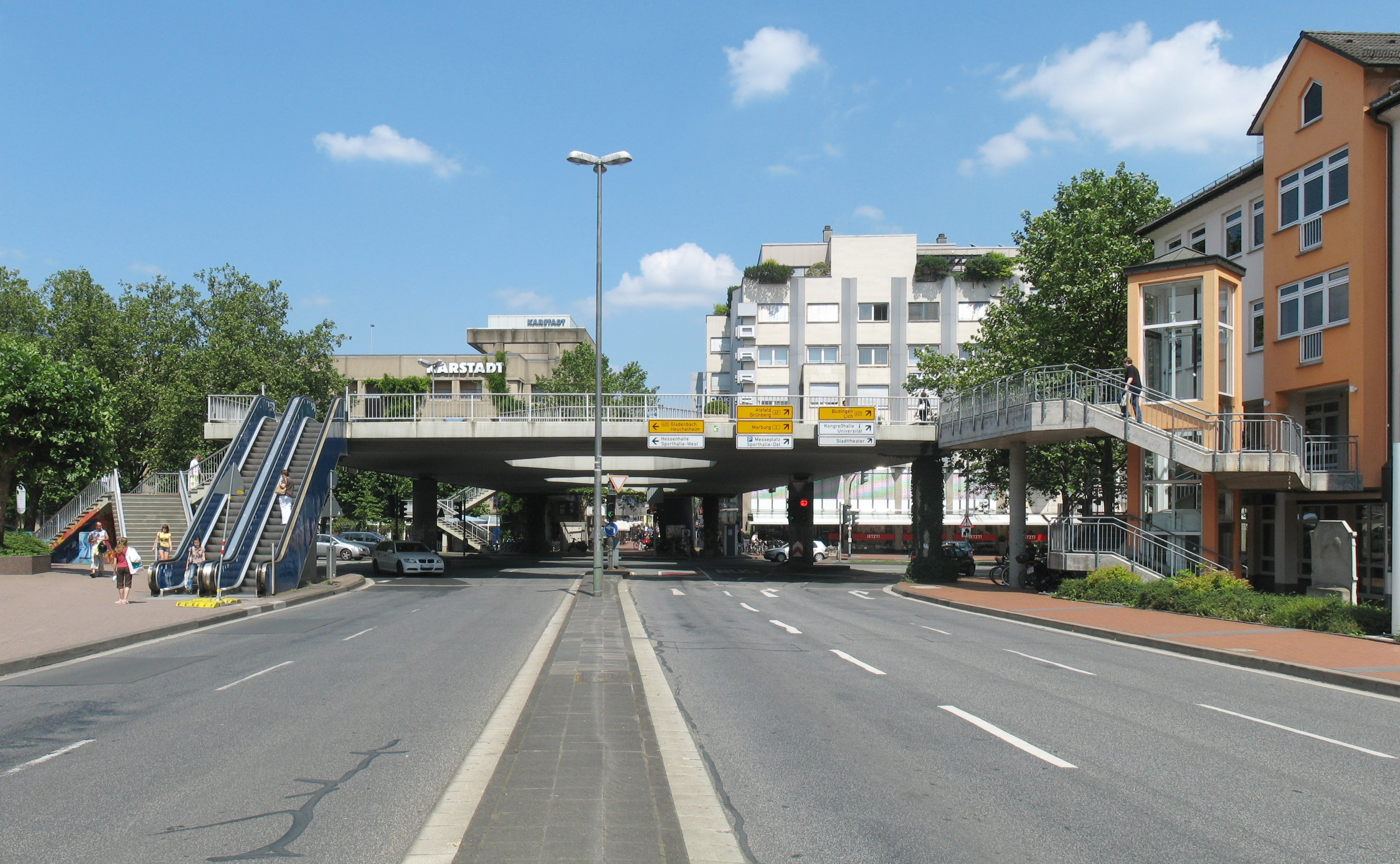 "Elefantenklo", eine Fußgängerüberführung am Südende der Gießener Innenstadt.